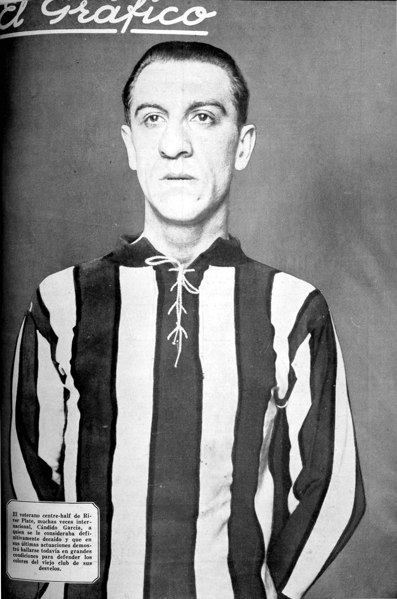 El Grafico del 15 de Enero de 1927. Edicion 393